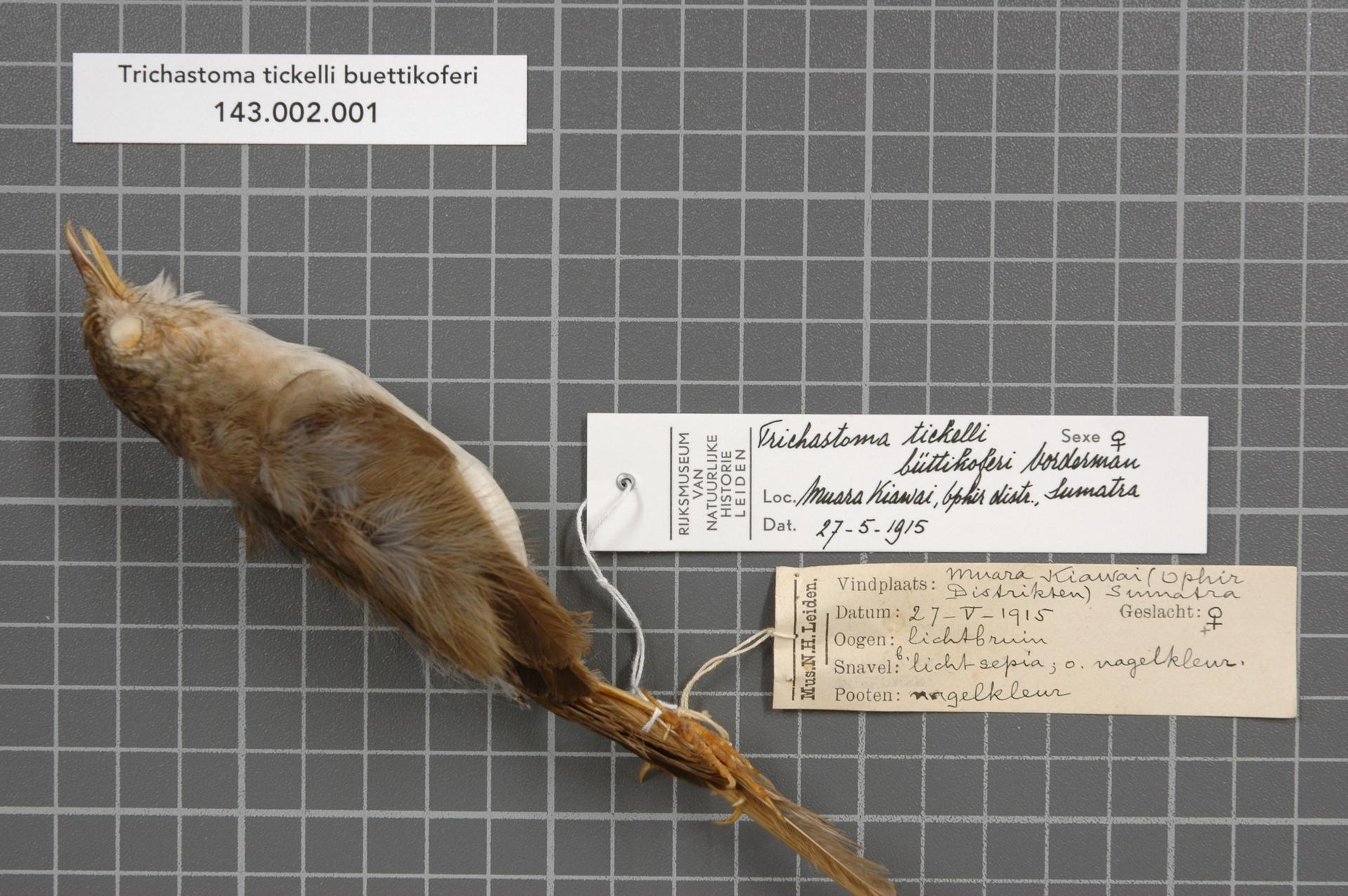 Trichastoma tickelli buettikoferi Vorderman, 1892